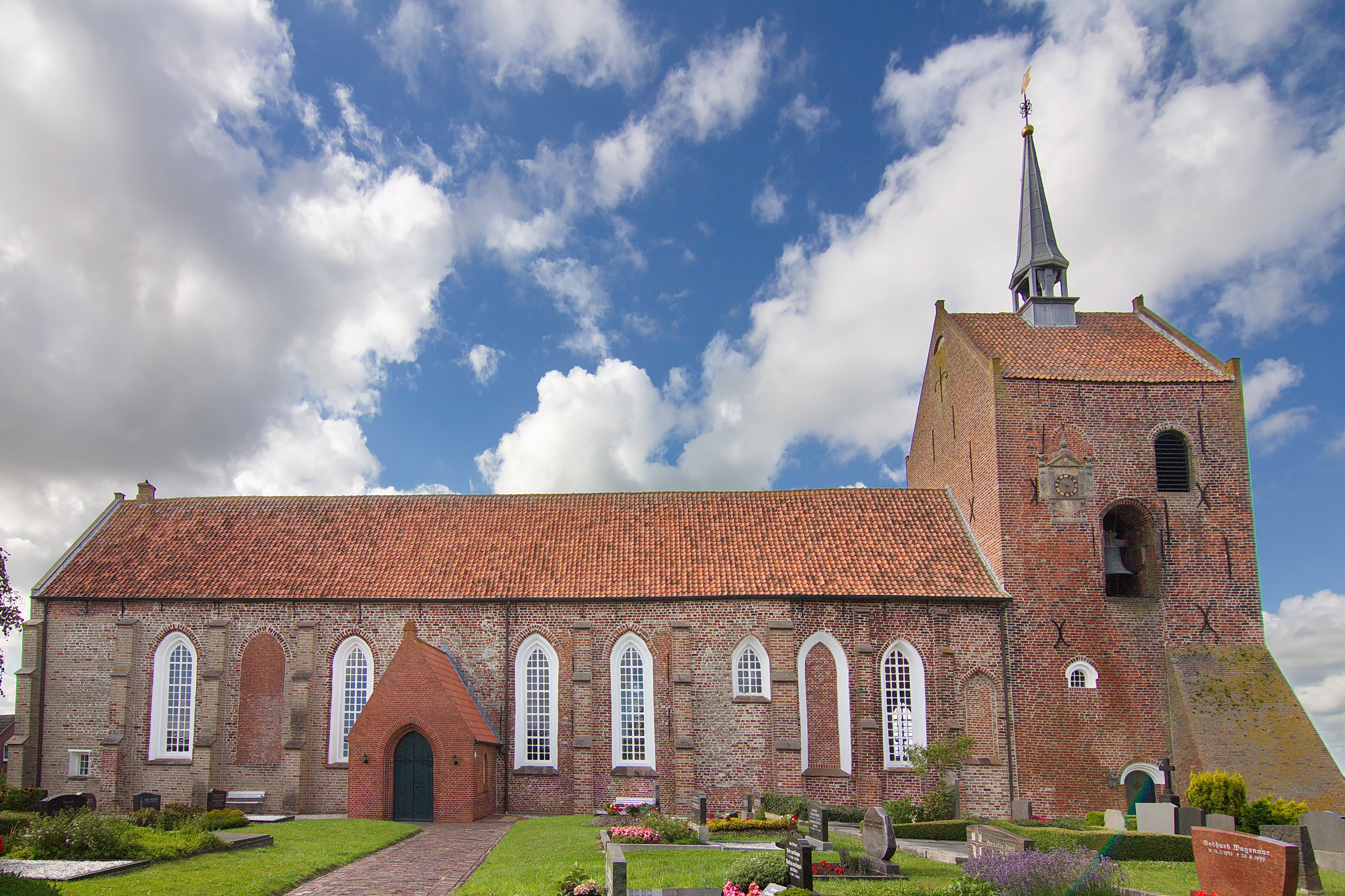 Kirche Groothusen (Krummhörn), Niedersachsen, Deutschland